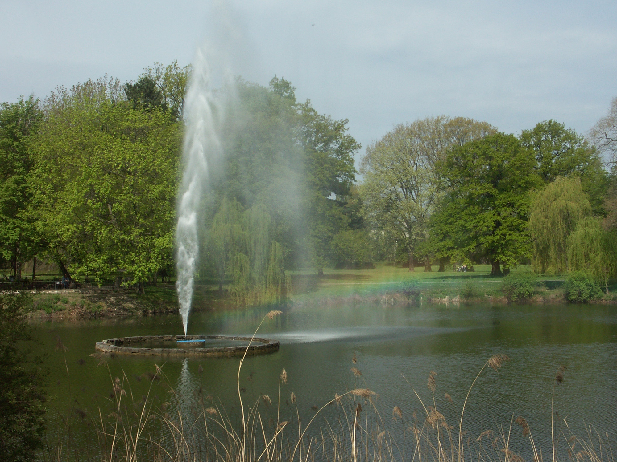 Fontäne im Palmengarten Leipzig